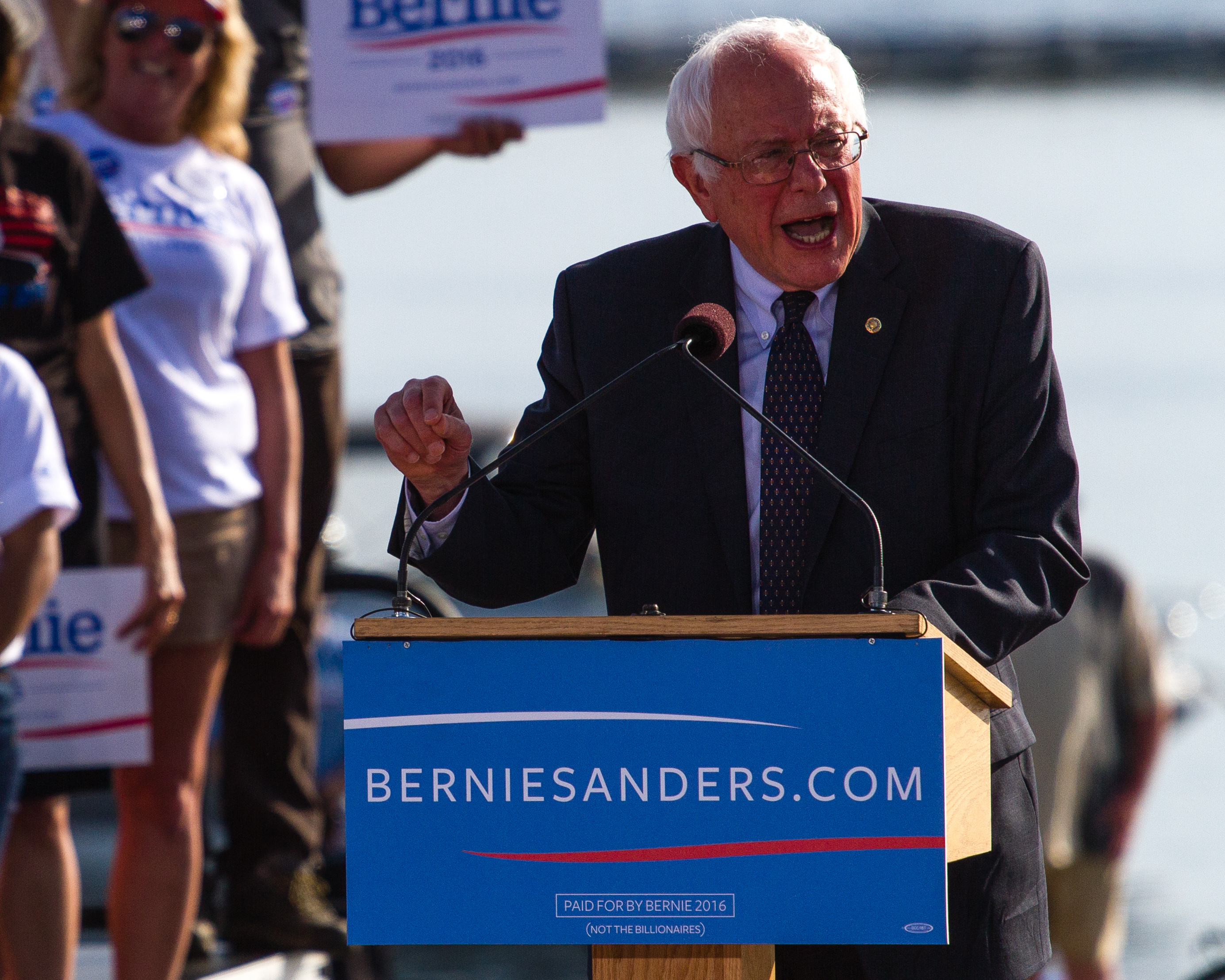 Bernie Sanders